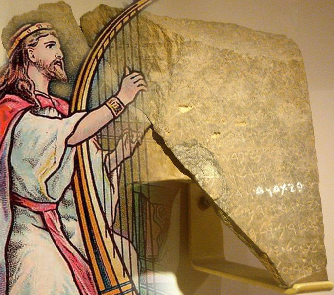 איור של דוד המלך לצד כתובת תל דן